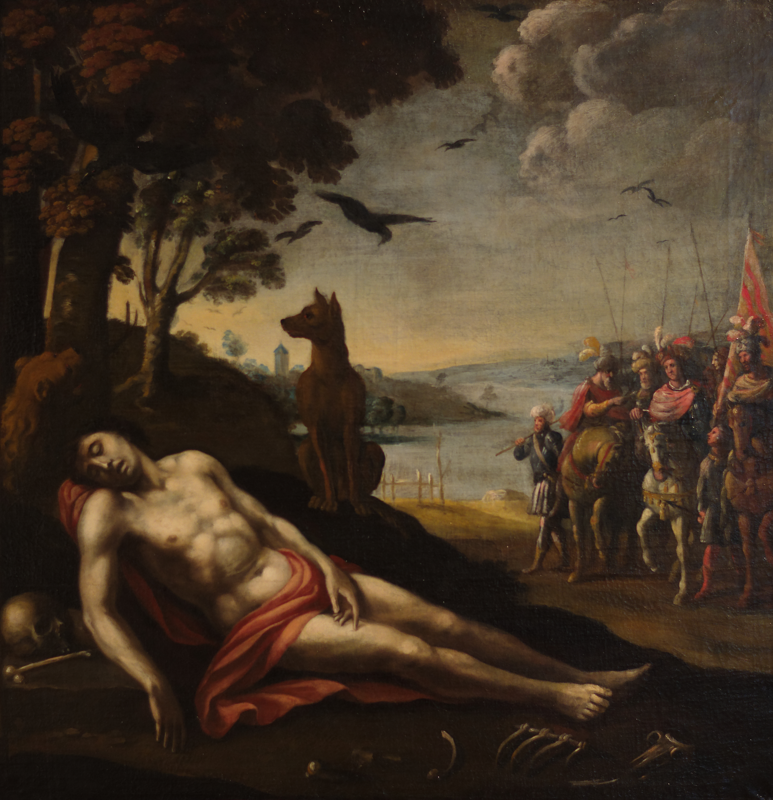 Saint-Vincent meurt de ses blessures, Guillaume Perrier. Huile sur toile, cathédrale Saint-Vincent à Mâcon. Déposé au musée des Ursulines de Mâcon en 1886. Inv A.126. Restauré par Aldo Paucelle en 2014 avec l'aide financière des amis du musée de Mâcon